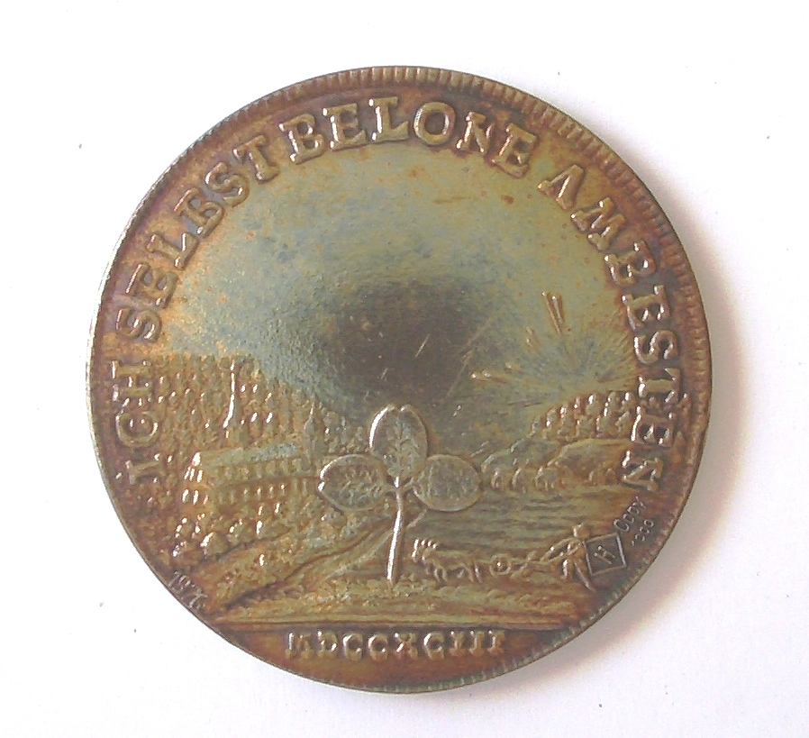 Kleetaler des Grafen Franz I. von Erbach-Erbach, 1793, Avers, Nachprägung 1978